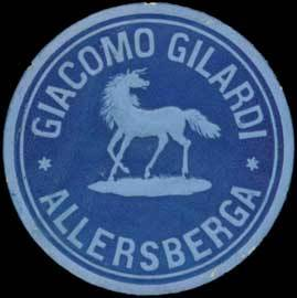 Siegelmarke Giacomo Gilardi Allersberga